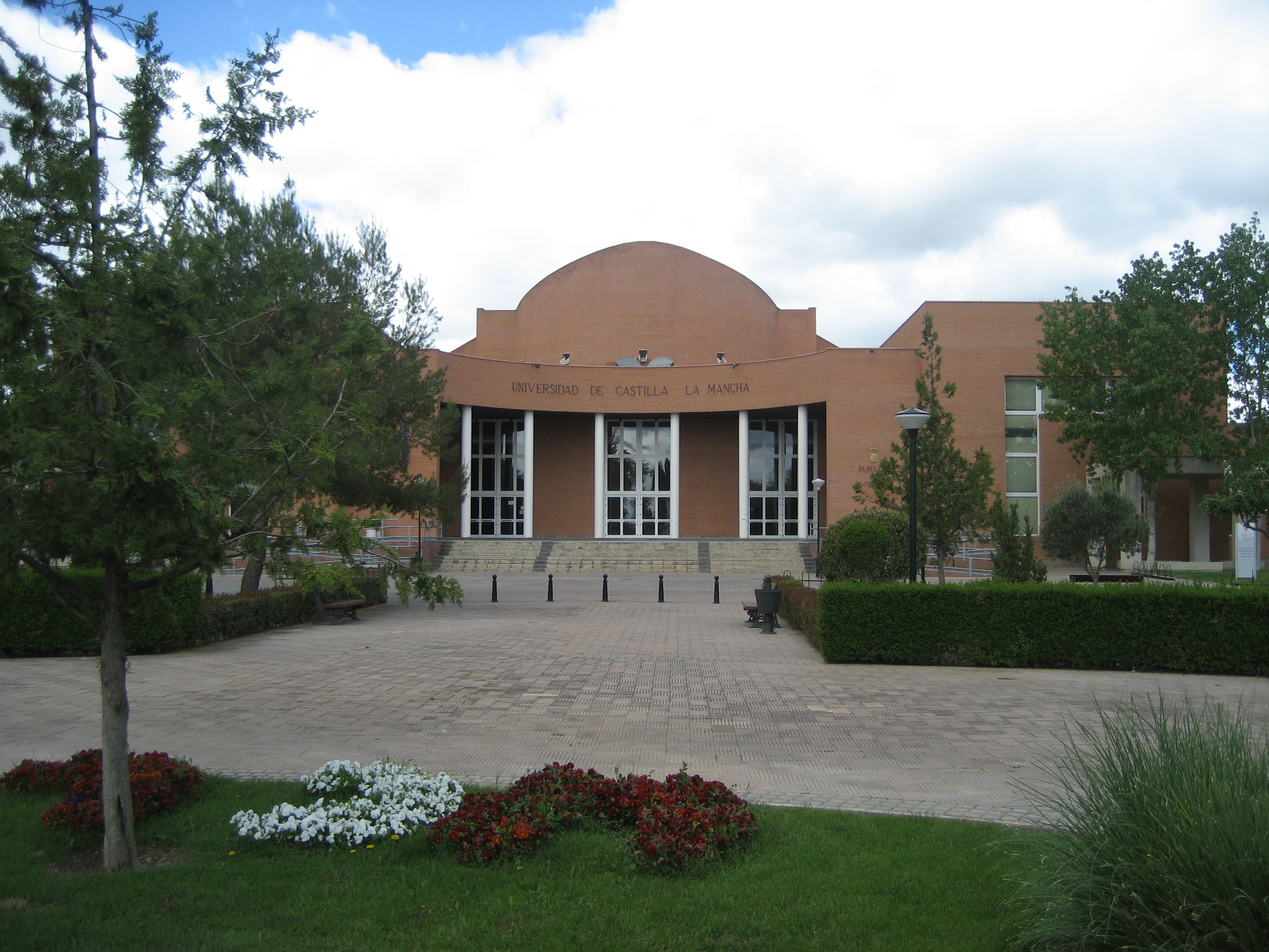 Campus Albacete UCLM